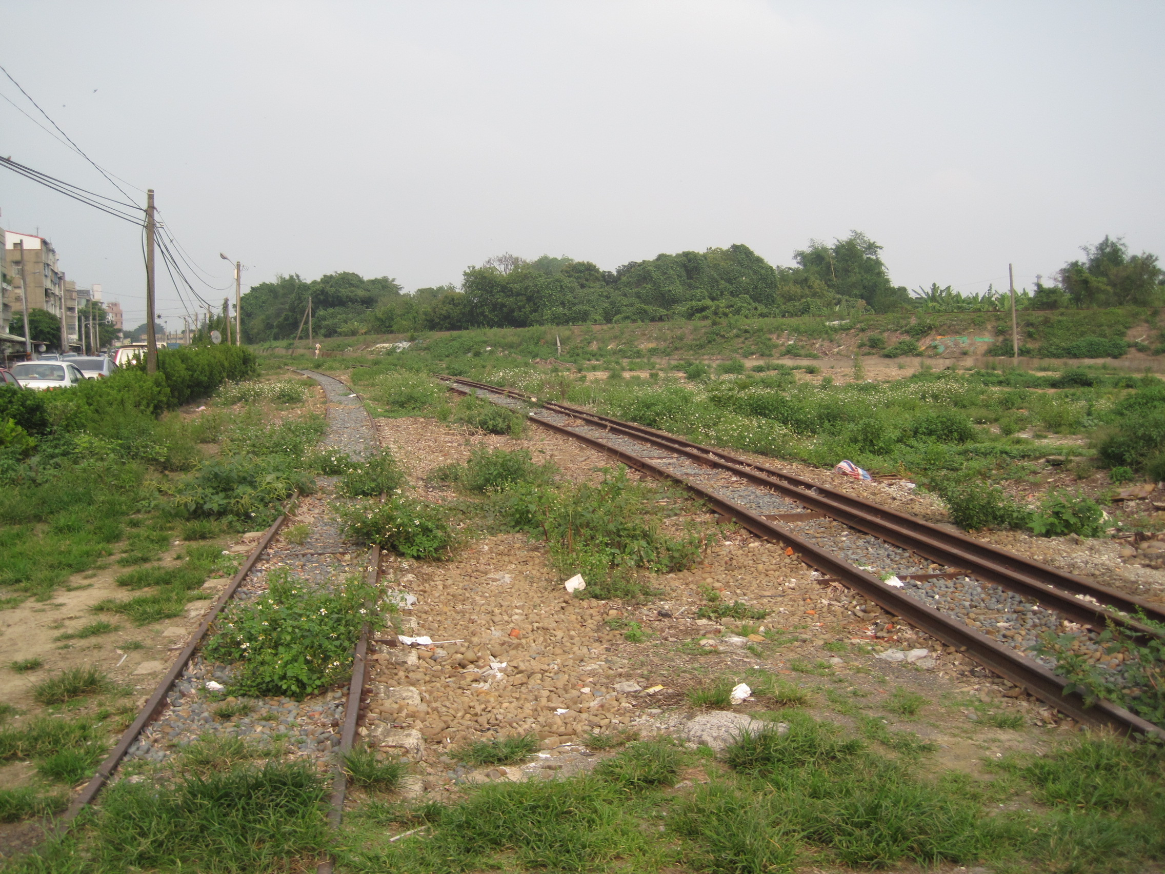 糖鐵布袋線、新岸三線與柳營線